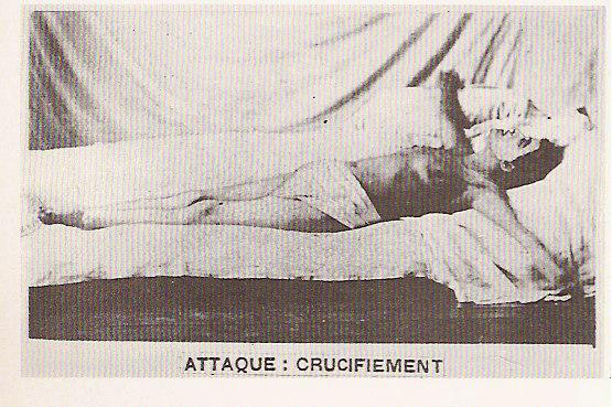 Crucifixion mystique, Iconographie de la Salpêtrière